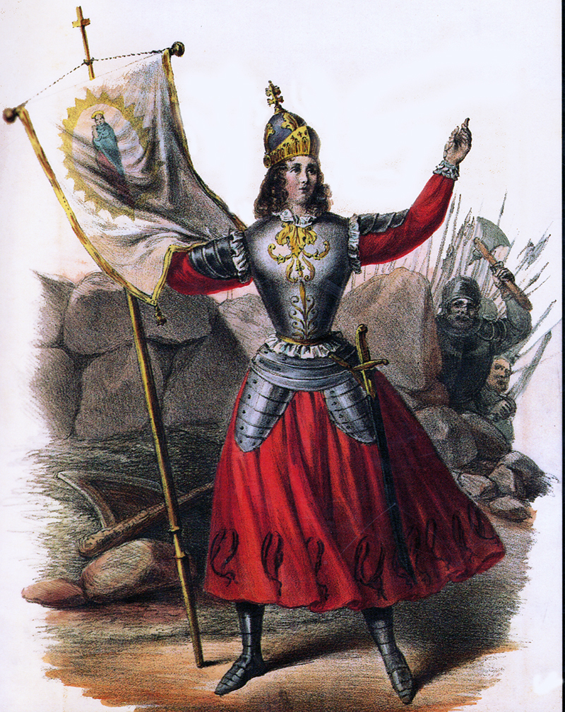 Emelie Högqvist (1812-1846) spelar titelrollen i Orleanska jungfrun av Schillers